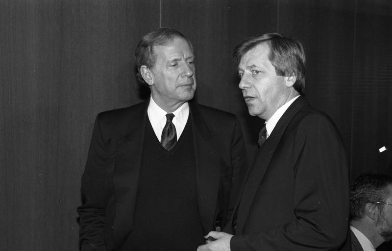 18.12.1986 Beratung der Ministerpräsidenten der Länder über einen Medien-Staatsvertrag in der Landesversammlung Hessen